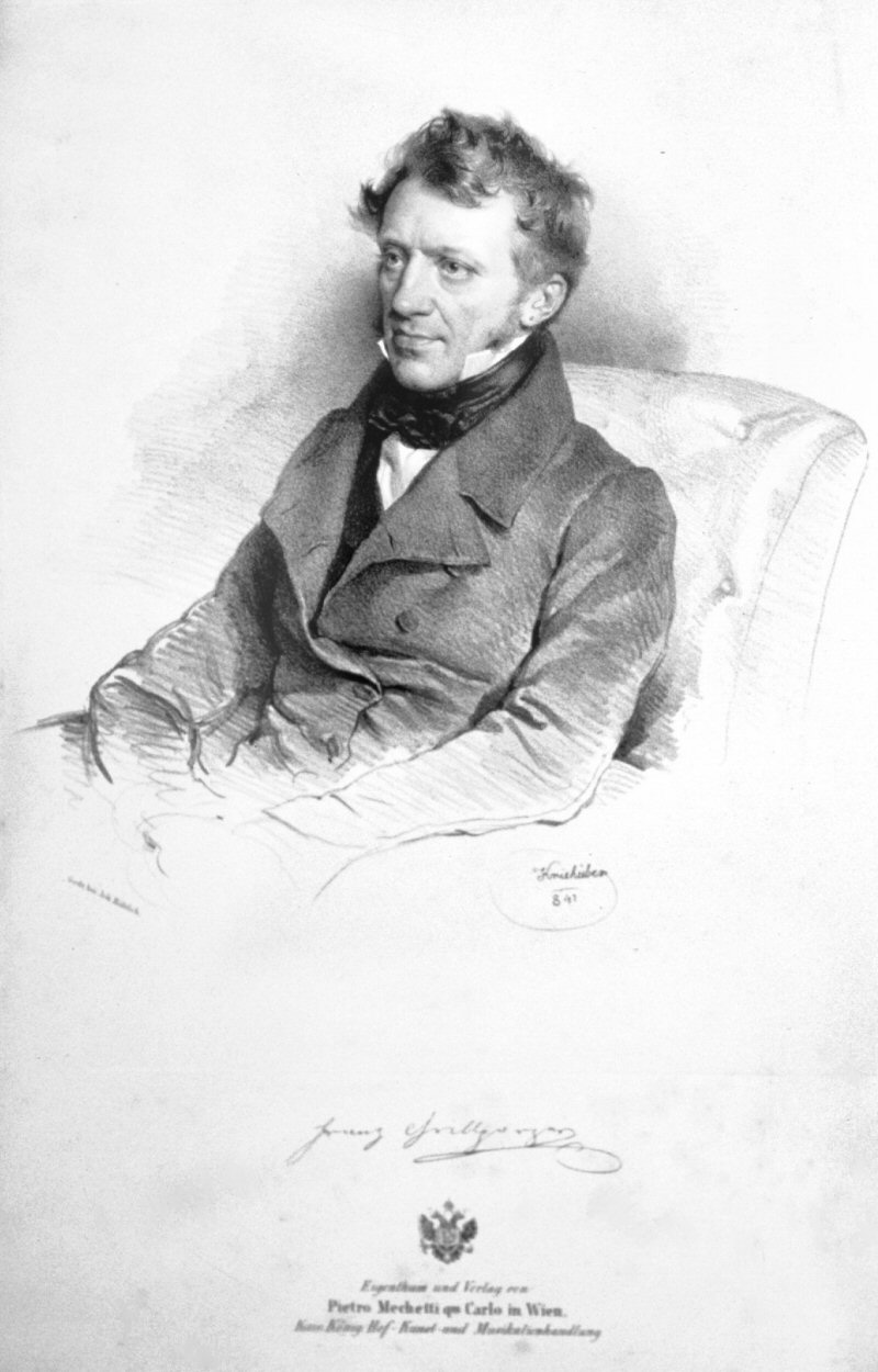 Franz Grillparzer; Porträtlithographie von Josef Kriehuber (1800-1876), 1841. Sammlung Peter Geymayer.